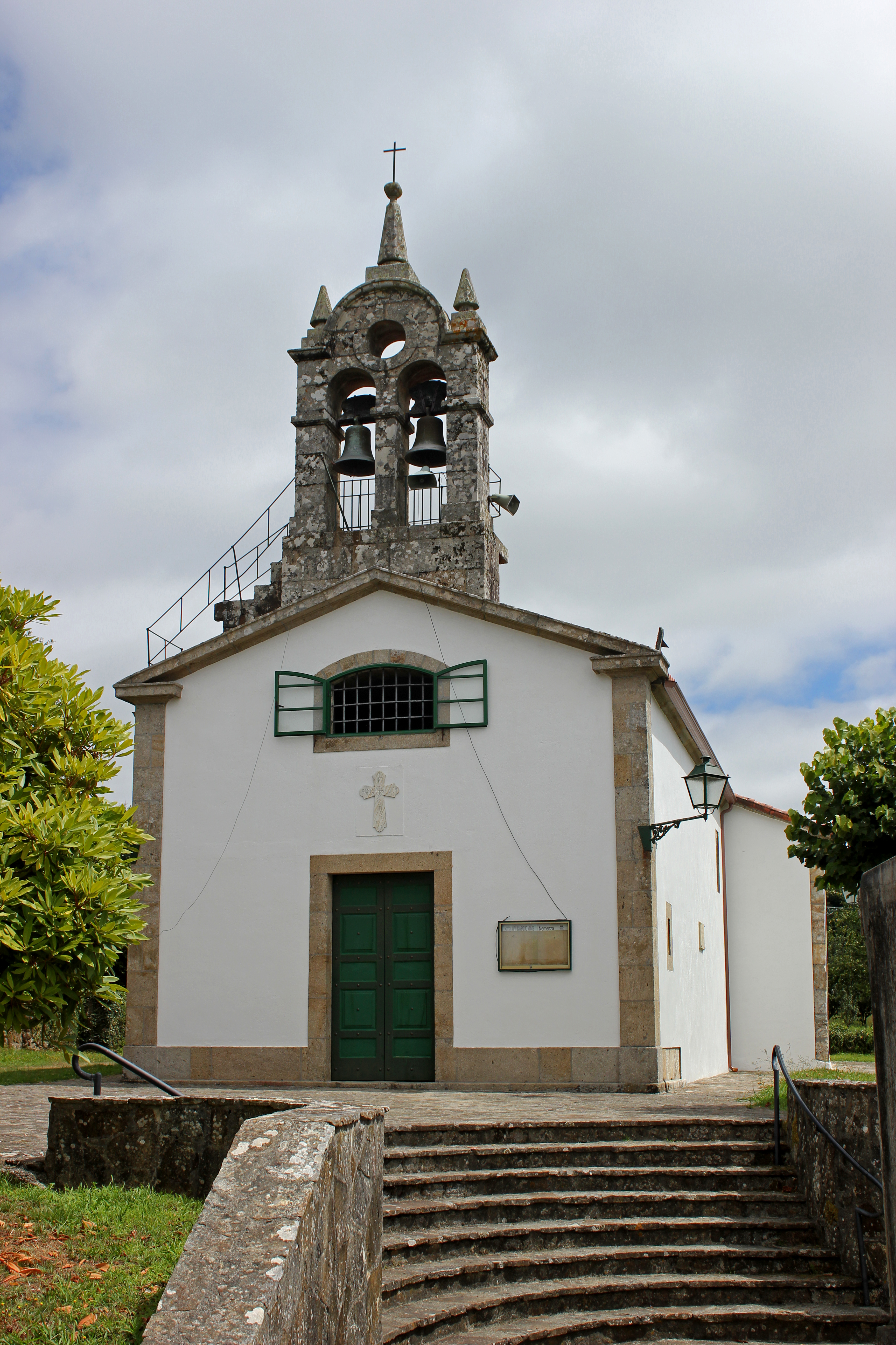 Igrexa de Nemenzo, Santiago de Compostela.